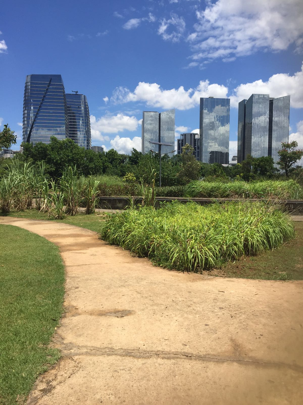 PARQUE DO POVO